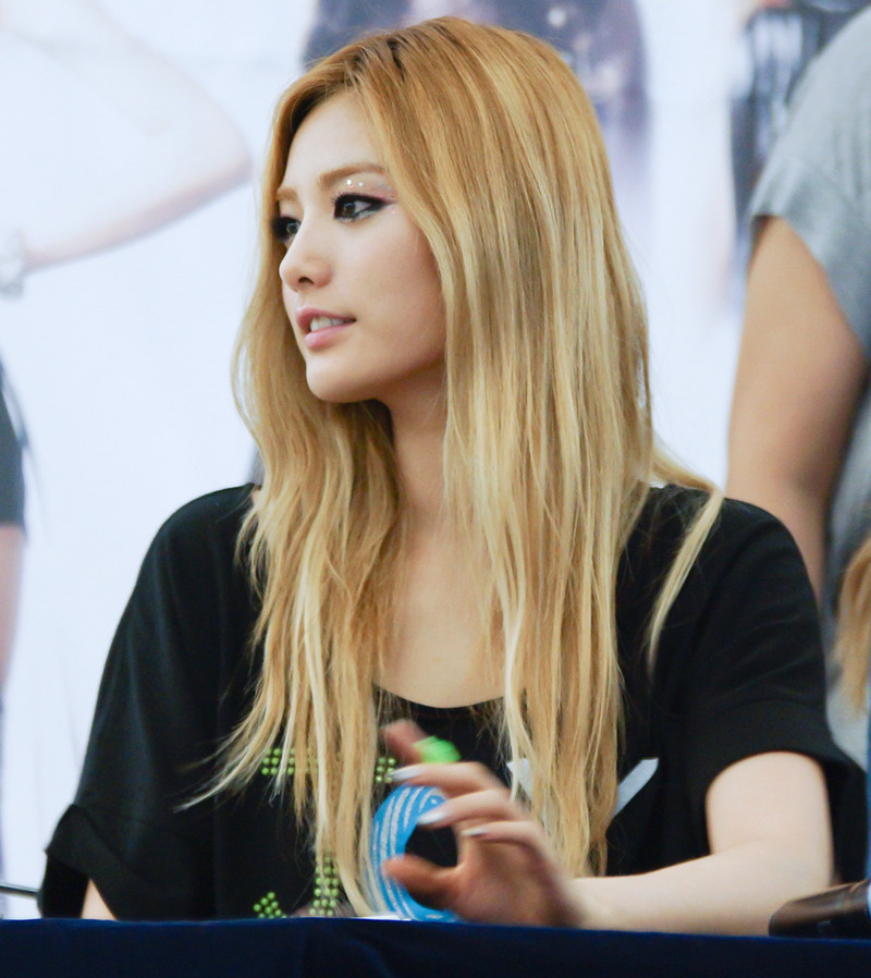 2012년 7월 1일 영등포 타임스퀘어 핫트랙스 팬사인회에서.